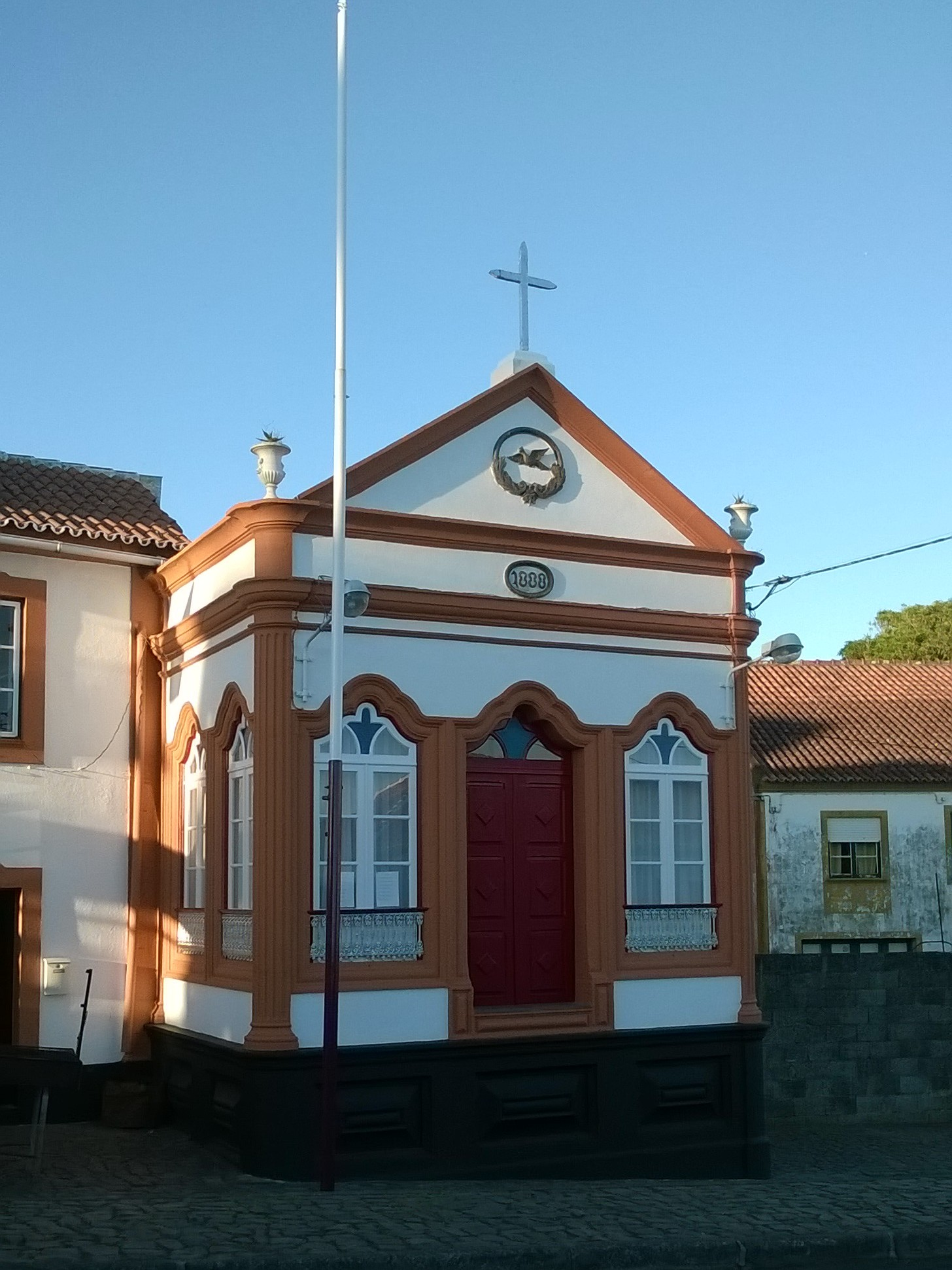 Império do Espírito Santo do Posto Santo, freguesia do Posto Santo, concelho de Angra do Heroísmo, ilha Terceira, Região Autónoma dos Açores, Portugal.